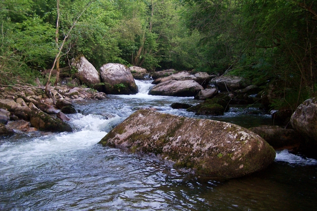 Rio Saja-Besaya en la localidad de Ganzo, municipio Torrelavega (Cantabria, España).